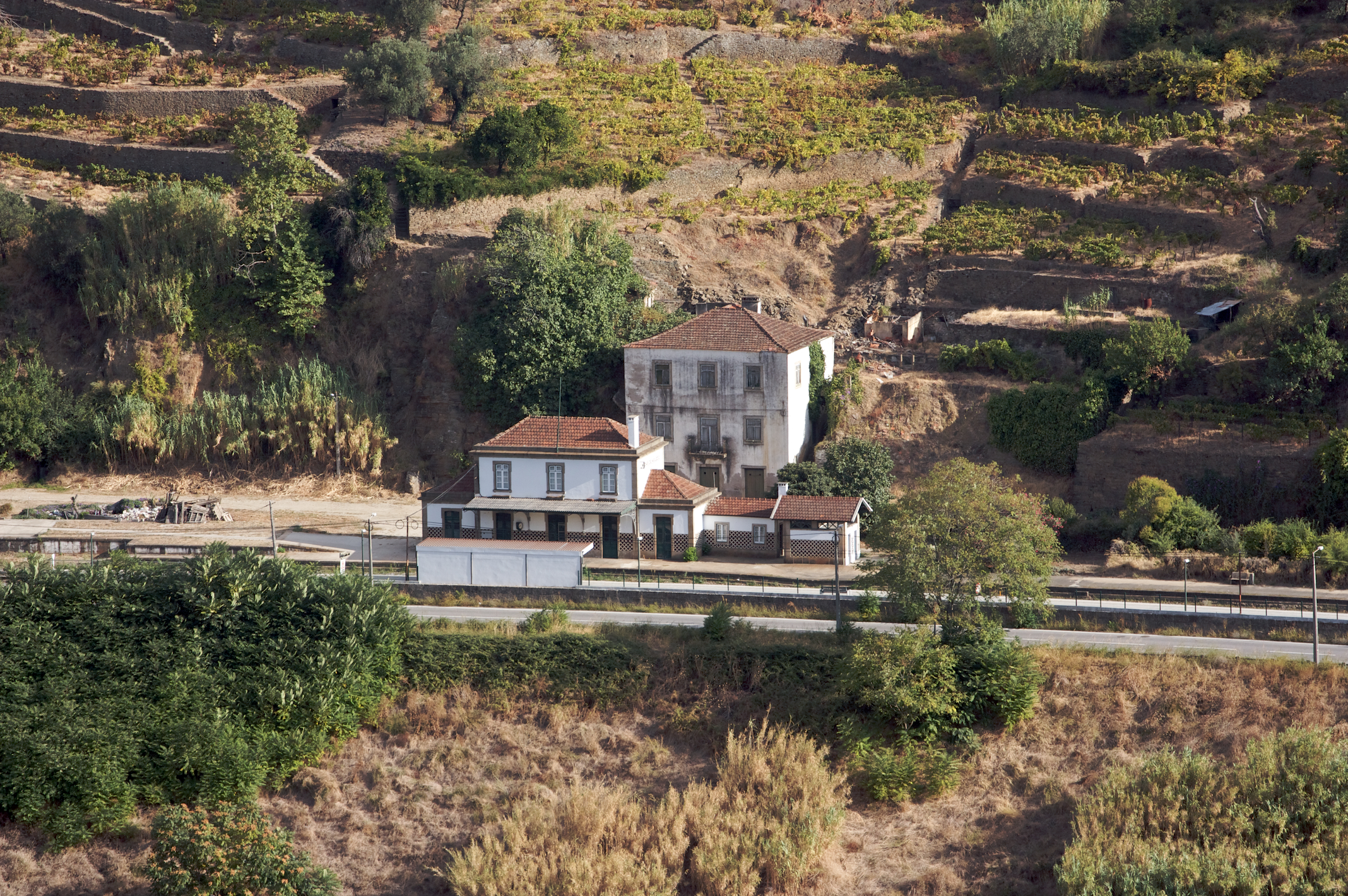 visto a partir da EN 222. Tipo: A [Apeadeiro] Local: Caldas de Moledo Linha do Douro, PK 98] Data e hora: 2 de Outubro de 2010 [09h50]